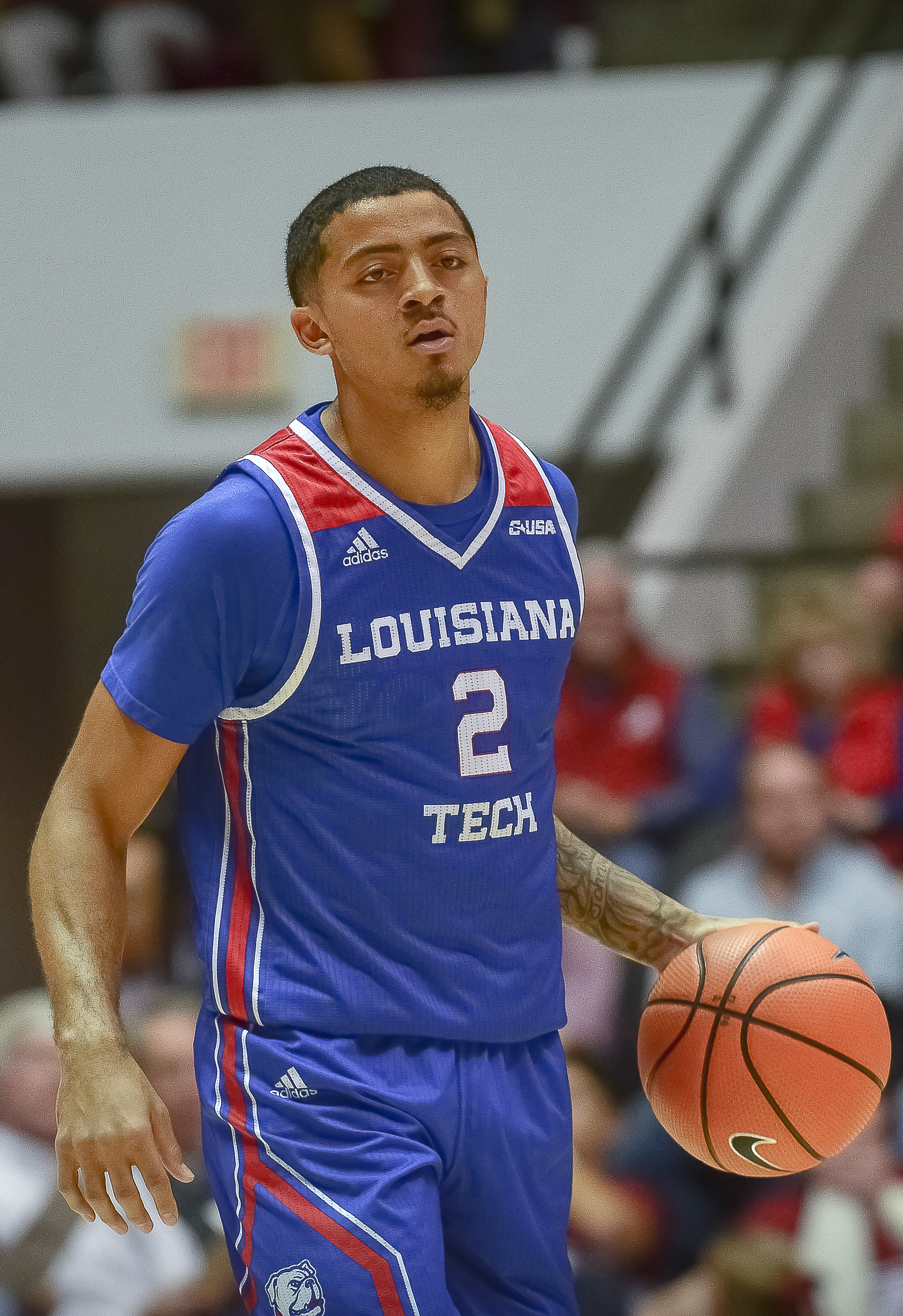 BEN_7496